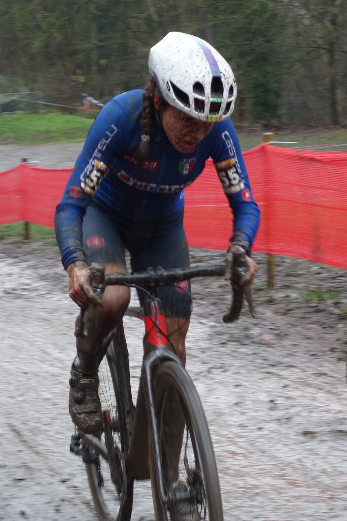 Wereldbeker veldrijden op de Citadel van Namen op zondag 22 december 2019